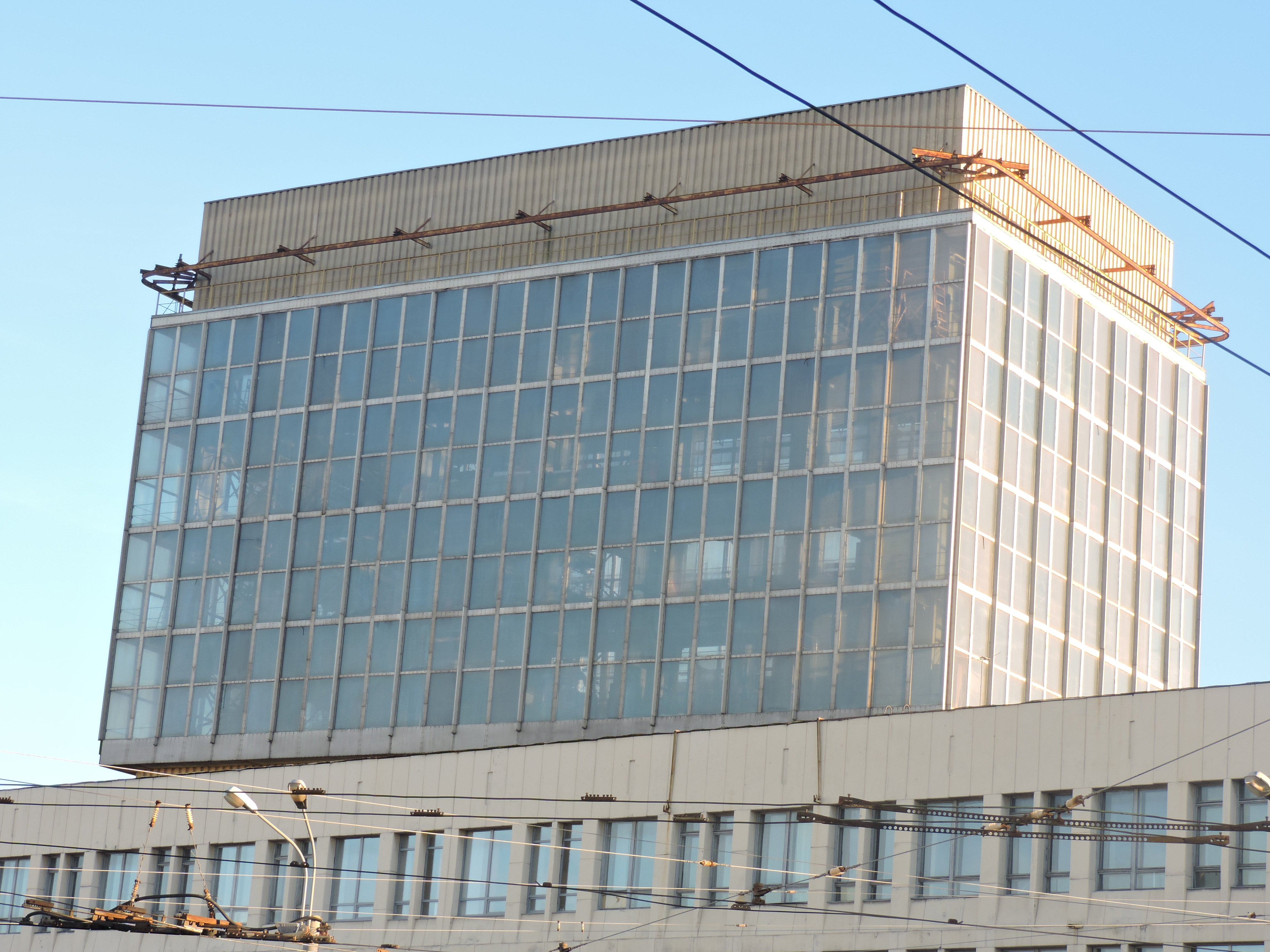 Почему-то это застеклённое сооружение ЦКБМ называют "Башня Быка"